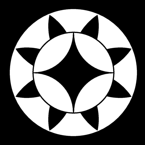 大岡七宝（おおおかしっぽう）は、日本の家紋「七宝紋」の一種である。大岡氏が用いたが、この図案のものは、特に大岡越前守忠相が用いた。